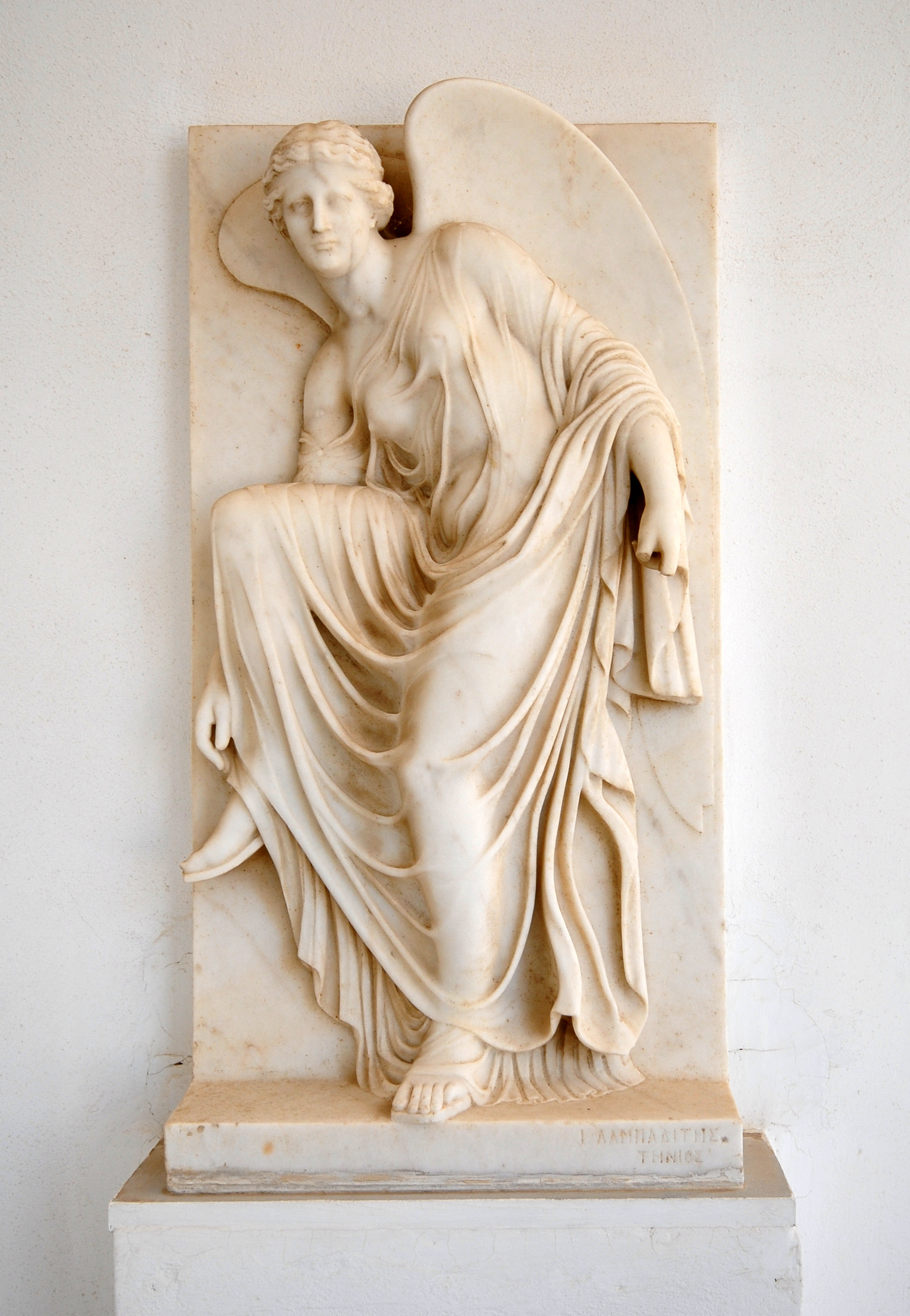 Skulptur im Hof der Marienbasilika auf Tinos